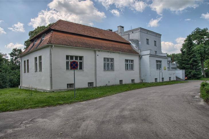 Żydowo Dwór Szołdrskich